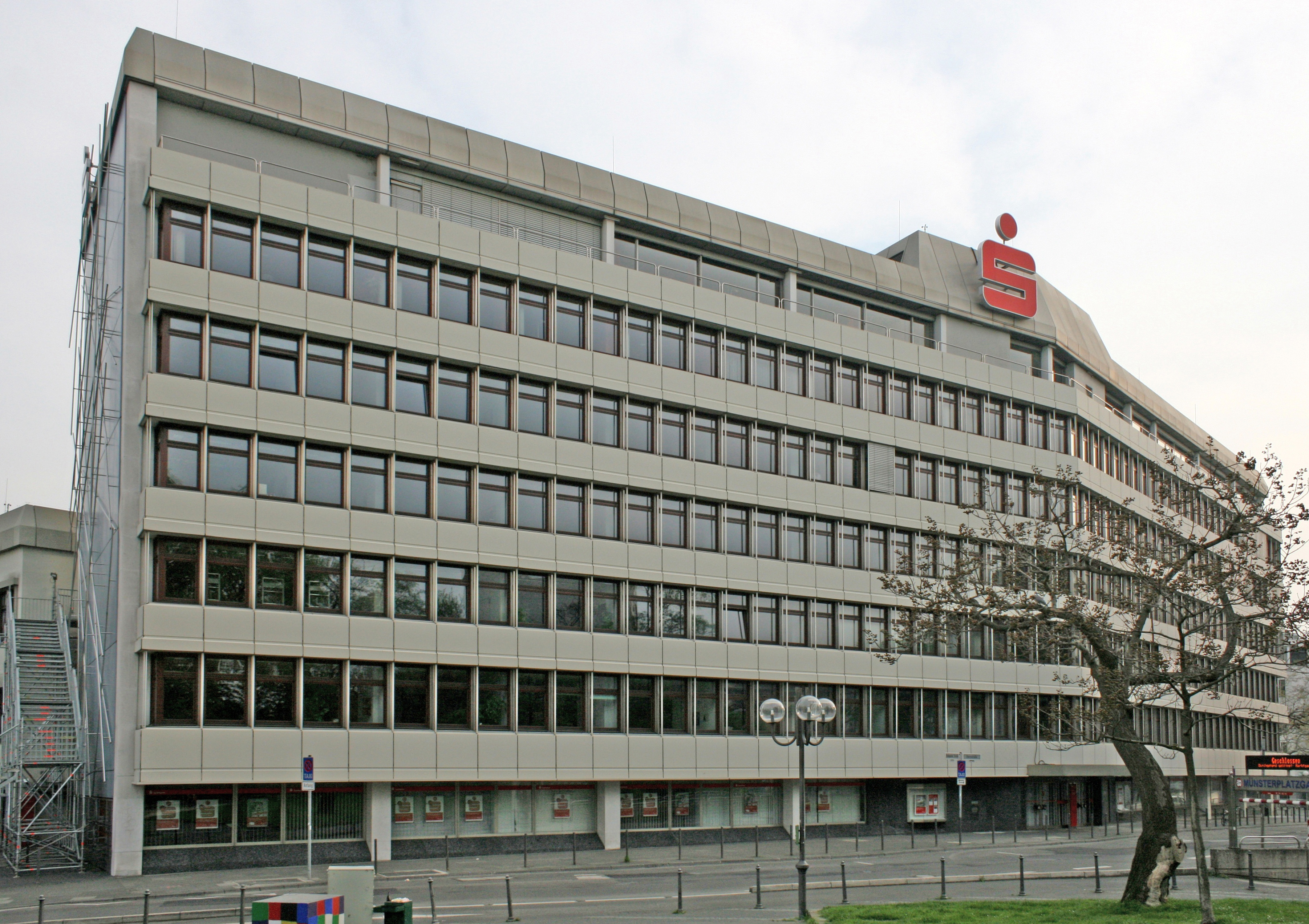 Bonn, ehemalige Bonner Hauptgeschäftsstelle der Sparkasse Köln-Bonn am Friedensplatz (inzwischen durch einen Neubau ersetzt): Ansicht von der Budapester Straße Ecke Sternstraße